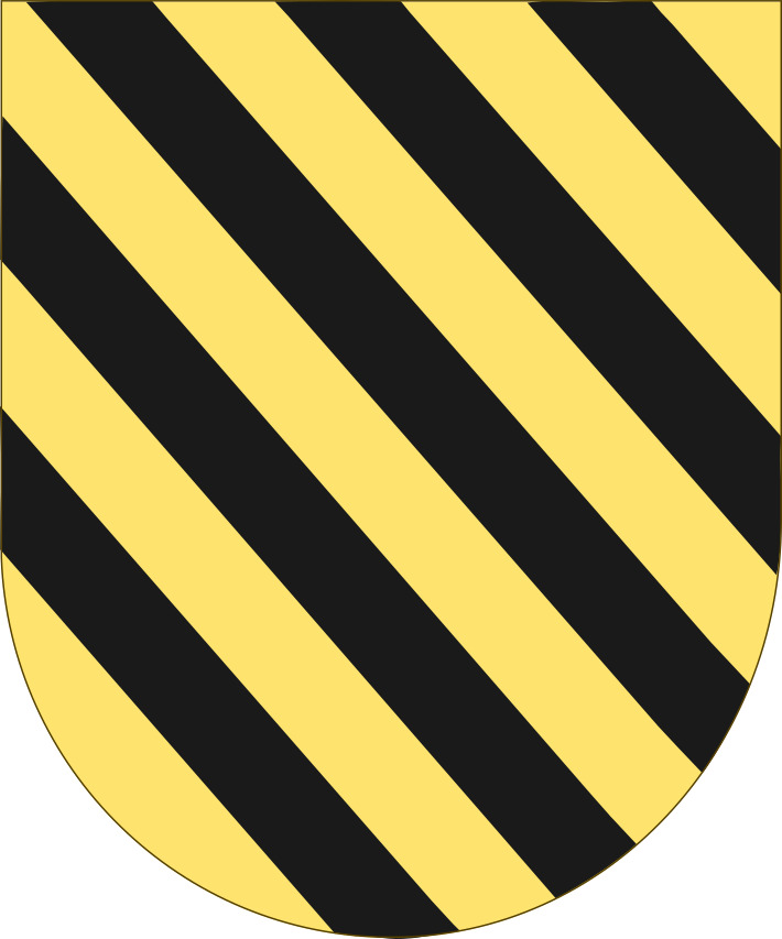 Escudo de Armas de la casa de Balda